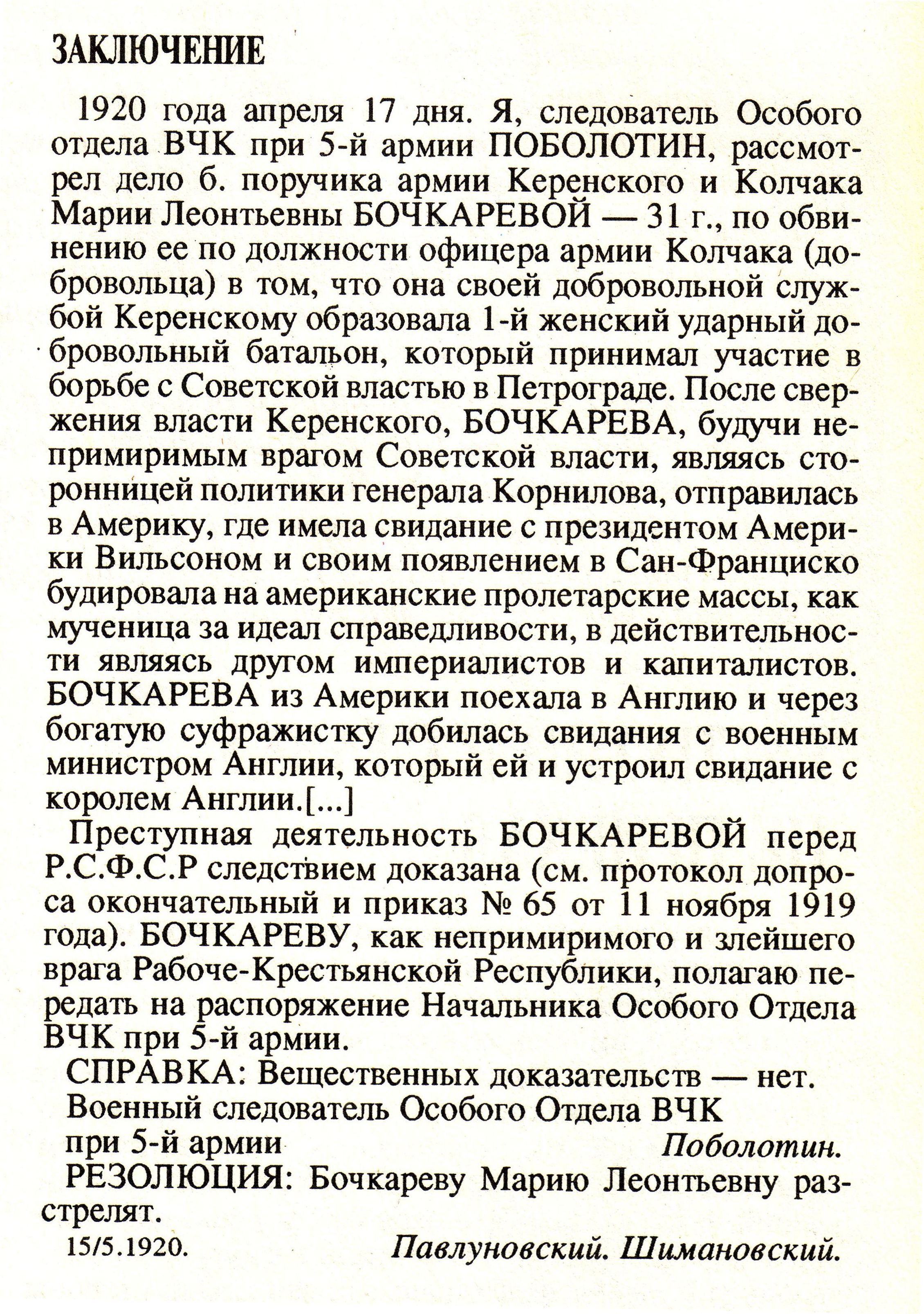 "Окончательный протокол допроса Марии Бочкарёвой. г. Красноярск. Заключение" (дословный, орфографические ошибки сохранены) к расстрелу героини Первой мировой войны Марии Бочкарёвой. Подписи Павлуновского и Шимановского.